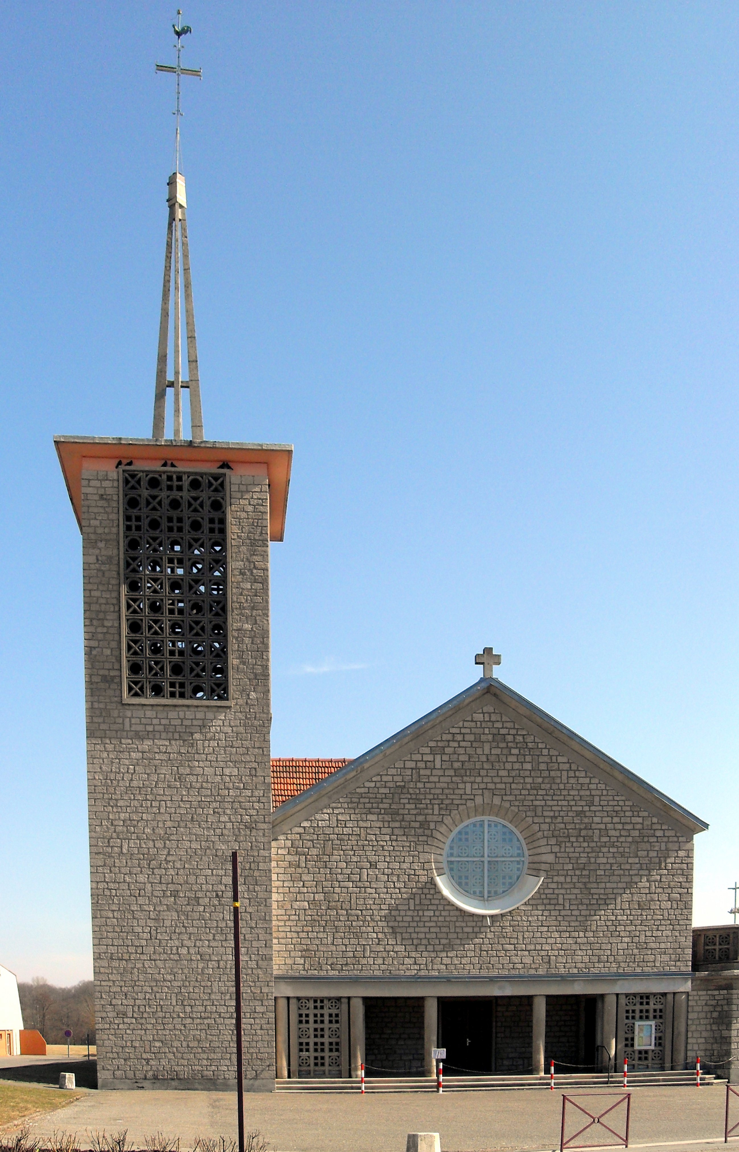 L'église Notre-Dame-de-la-Paix à Montreux-Château